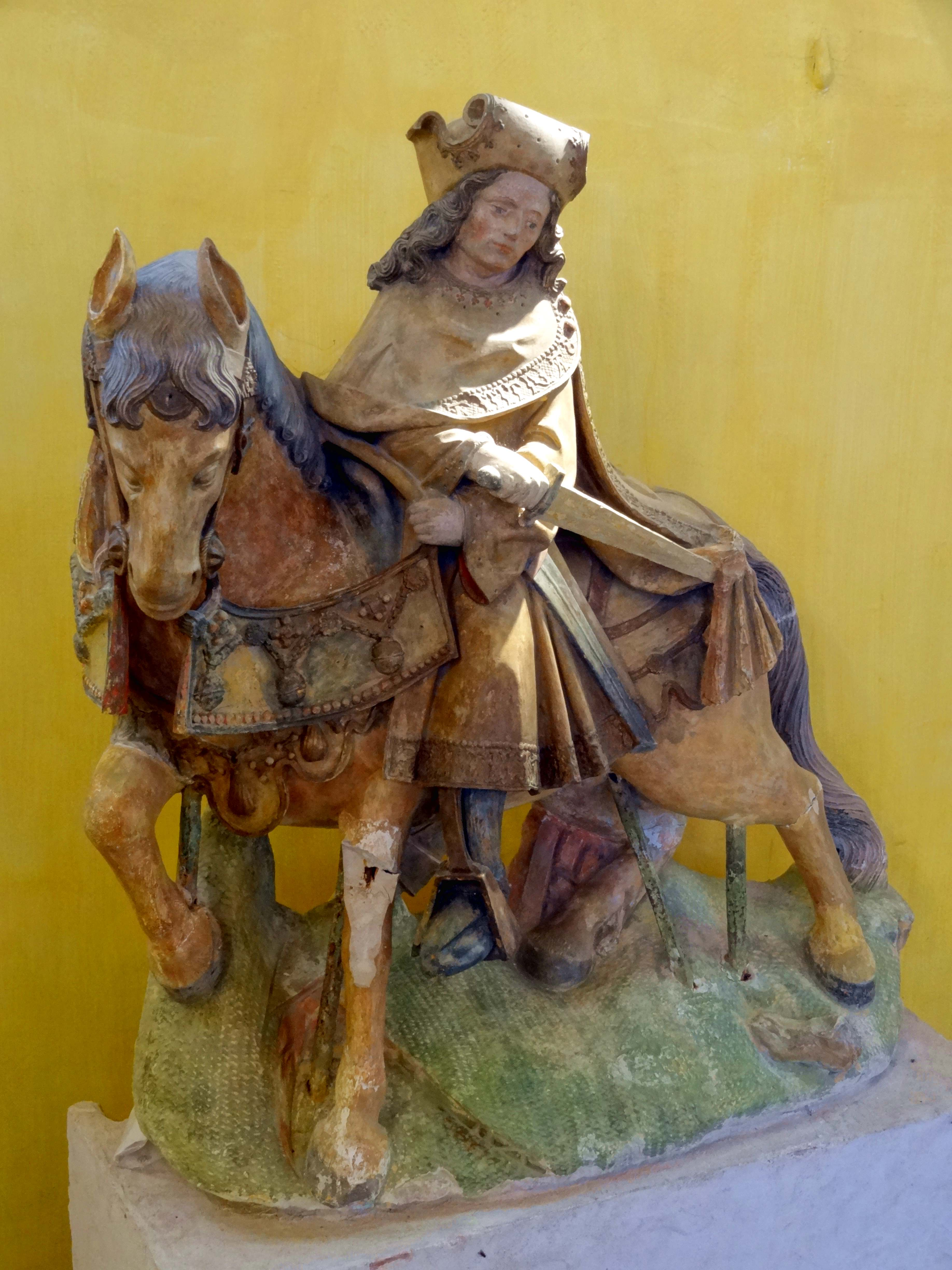 Mobilier de l'église - voir titre.